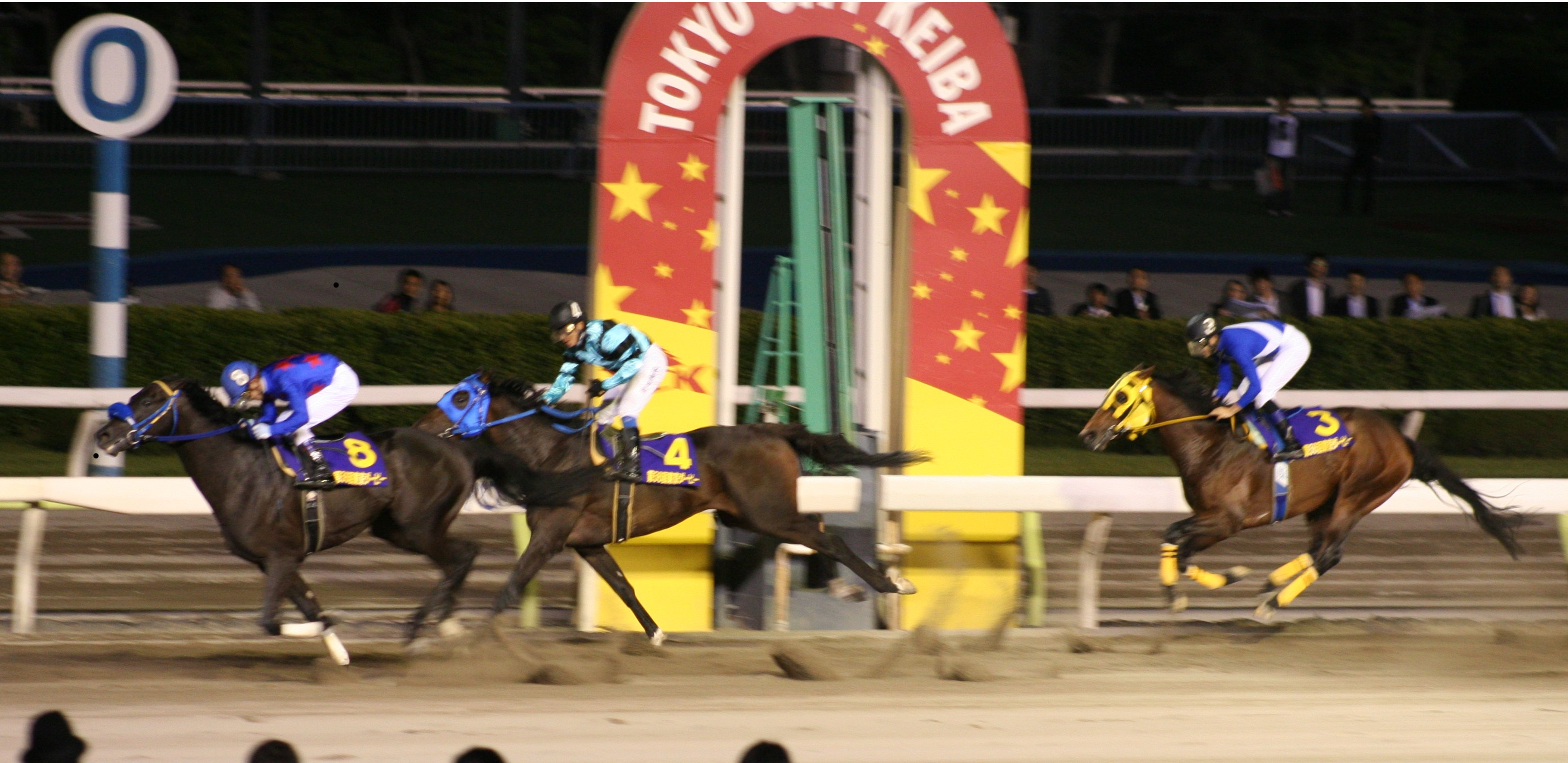 第56回東京ダービー（大井競馬場）